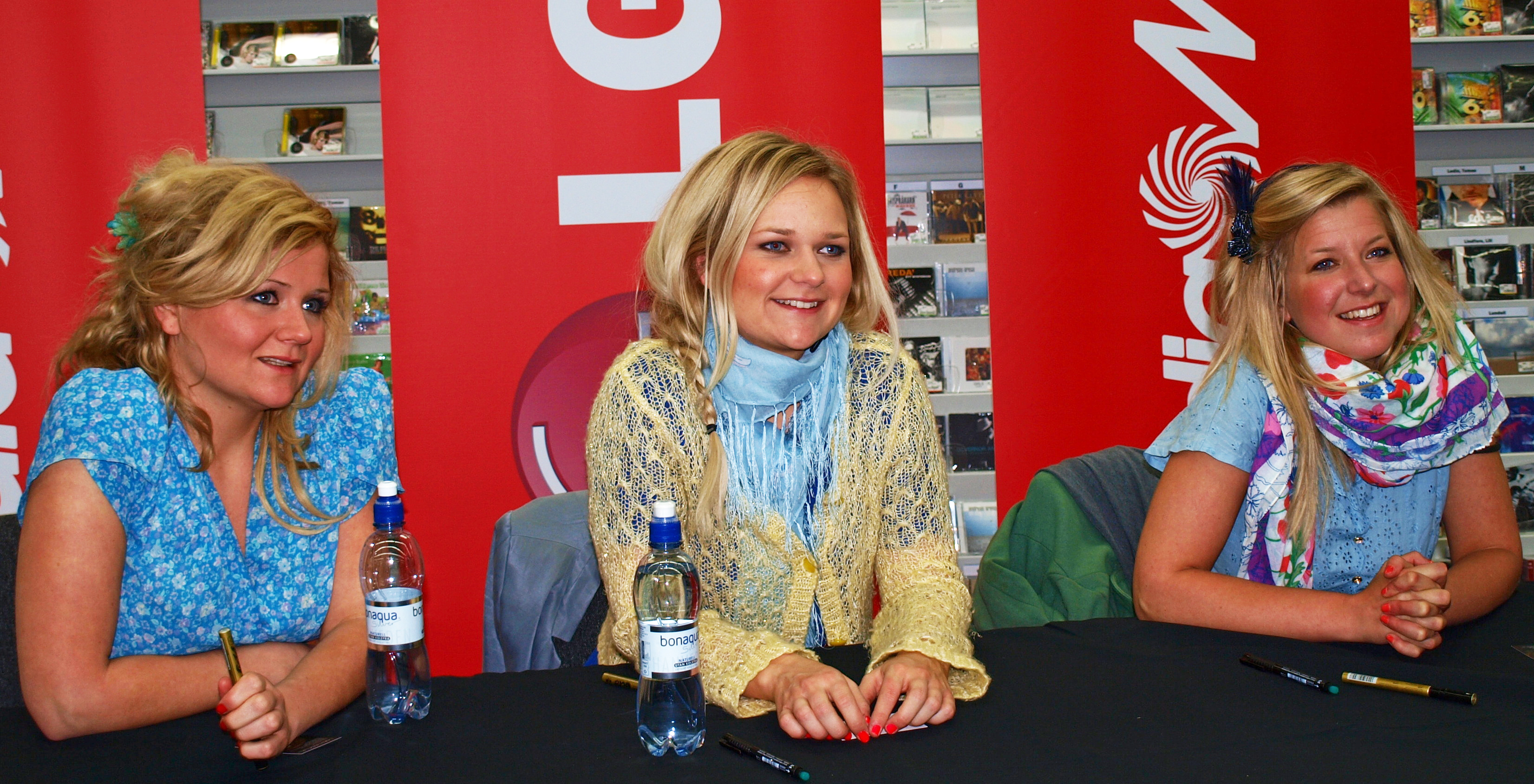 Cookies 'N' Beans i Norrköping 2010-04-23